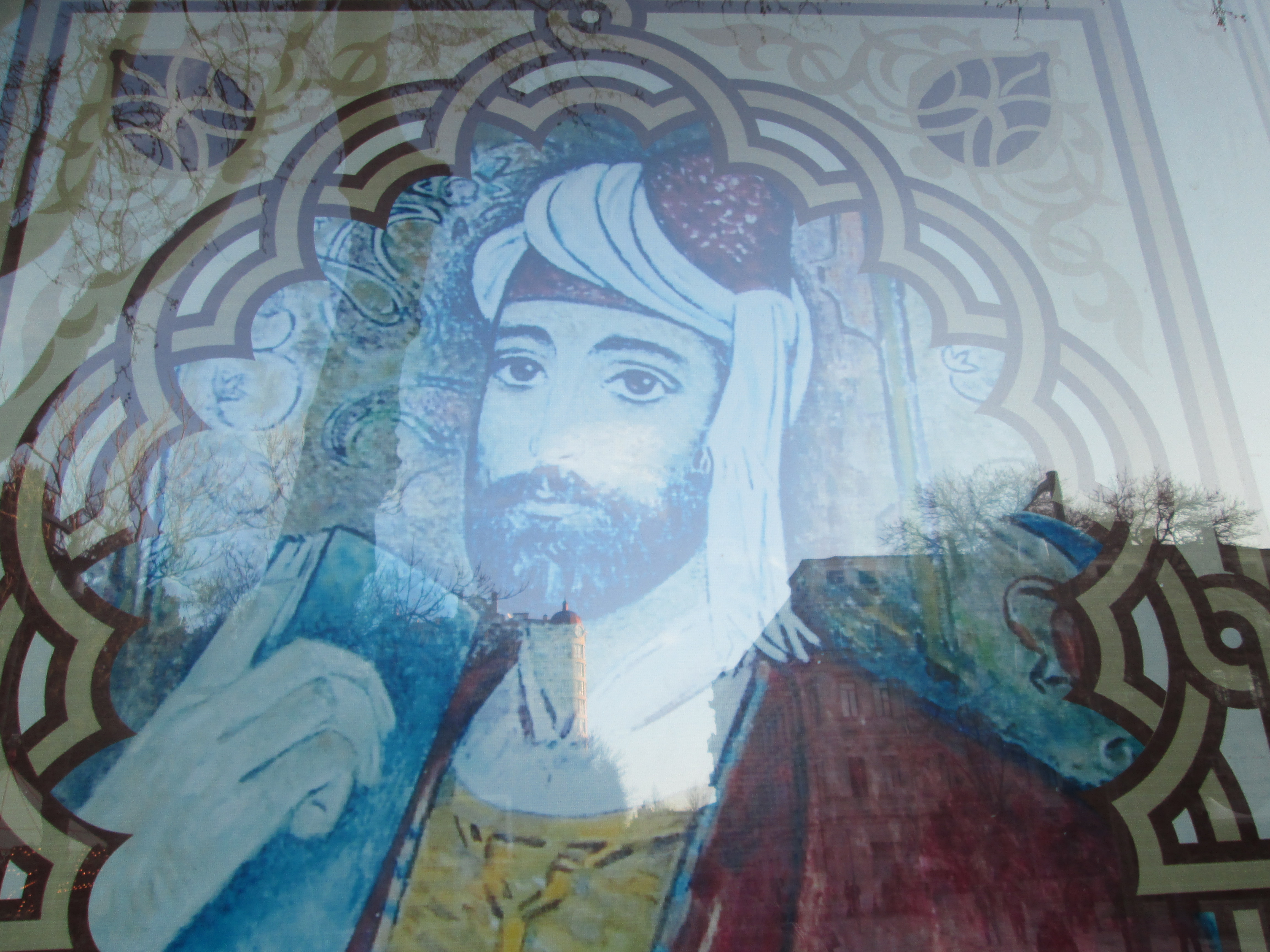 Nizami adına Ədəbiyyat Muzeyinin binasının pəncərəsində Həbibi Bərgüşadlı rəsmi